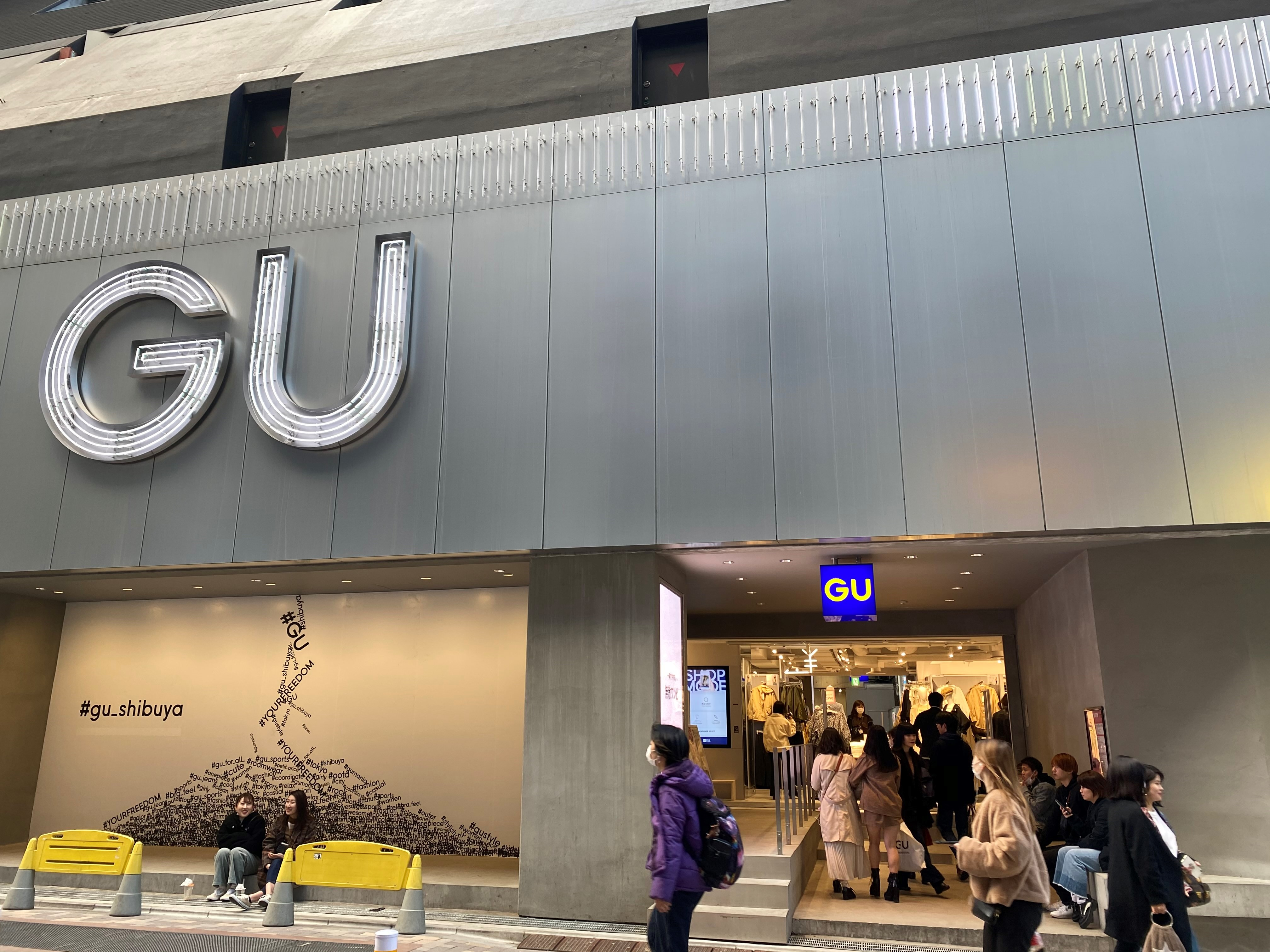 ジーユー渋谷店